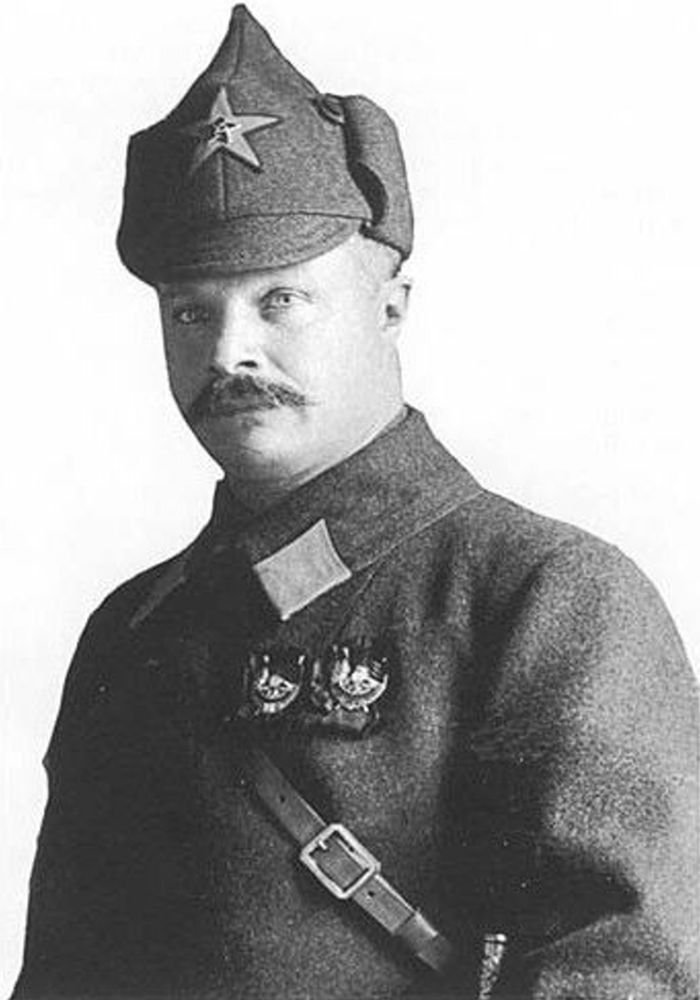 Михаил Васильевич Фрунзе (1885 — 1925) — советский государственный и военный деятель